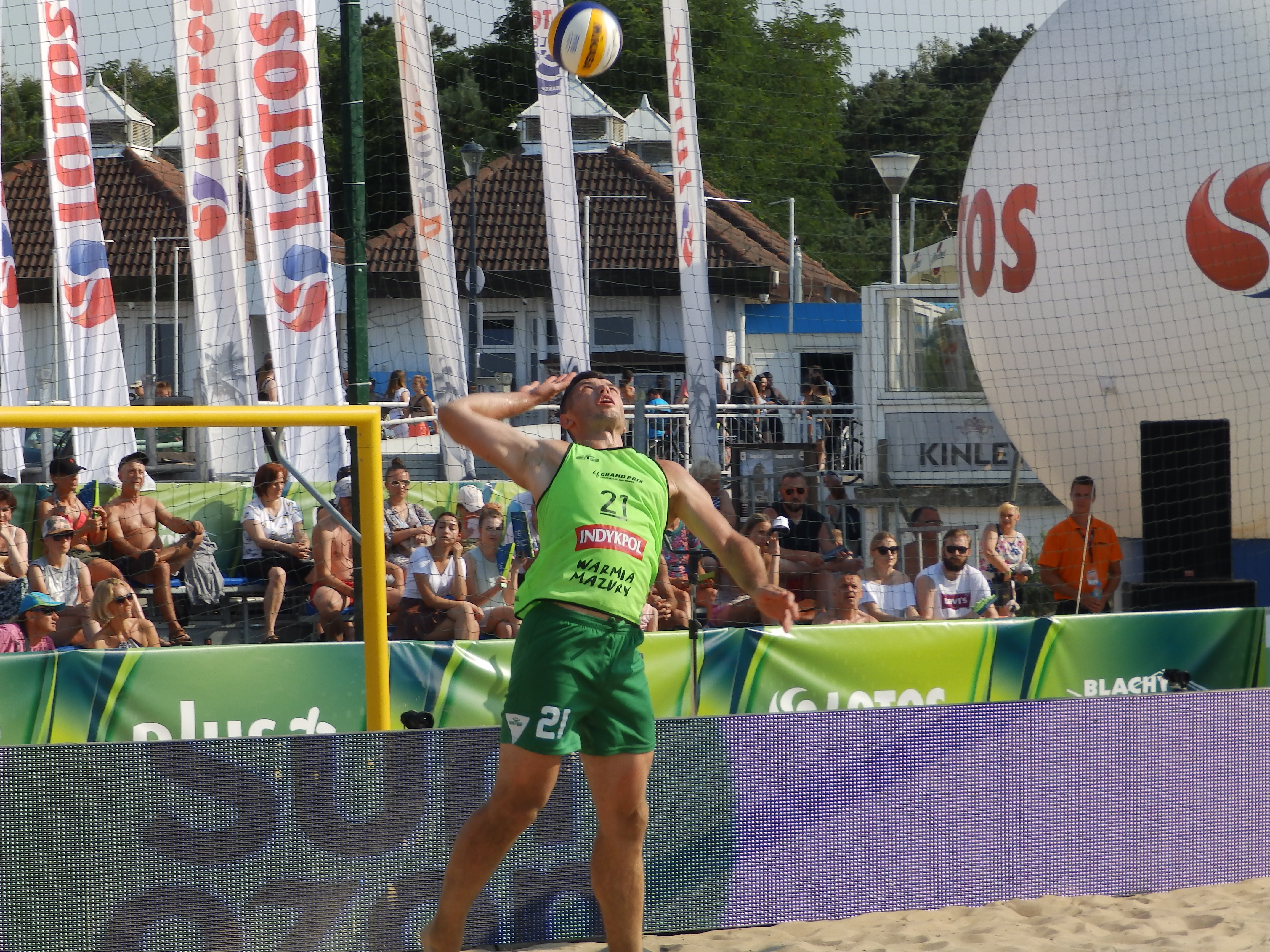 Siatkówka - Gdańsk 9.08.2020